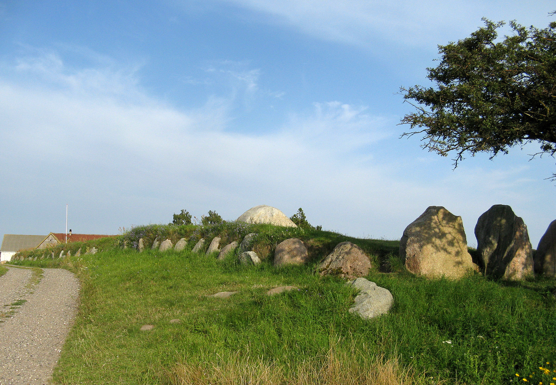 Langdyssen Grønsalen ved Fanefjord på den sydlige del af Møn